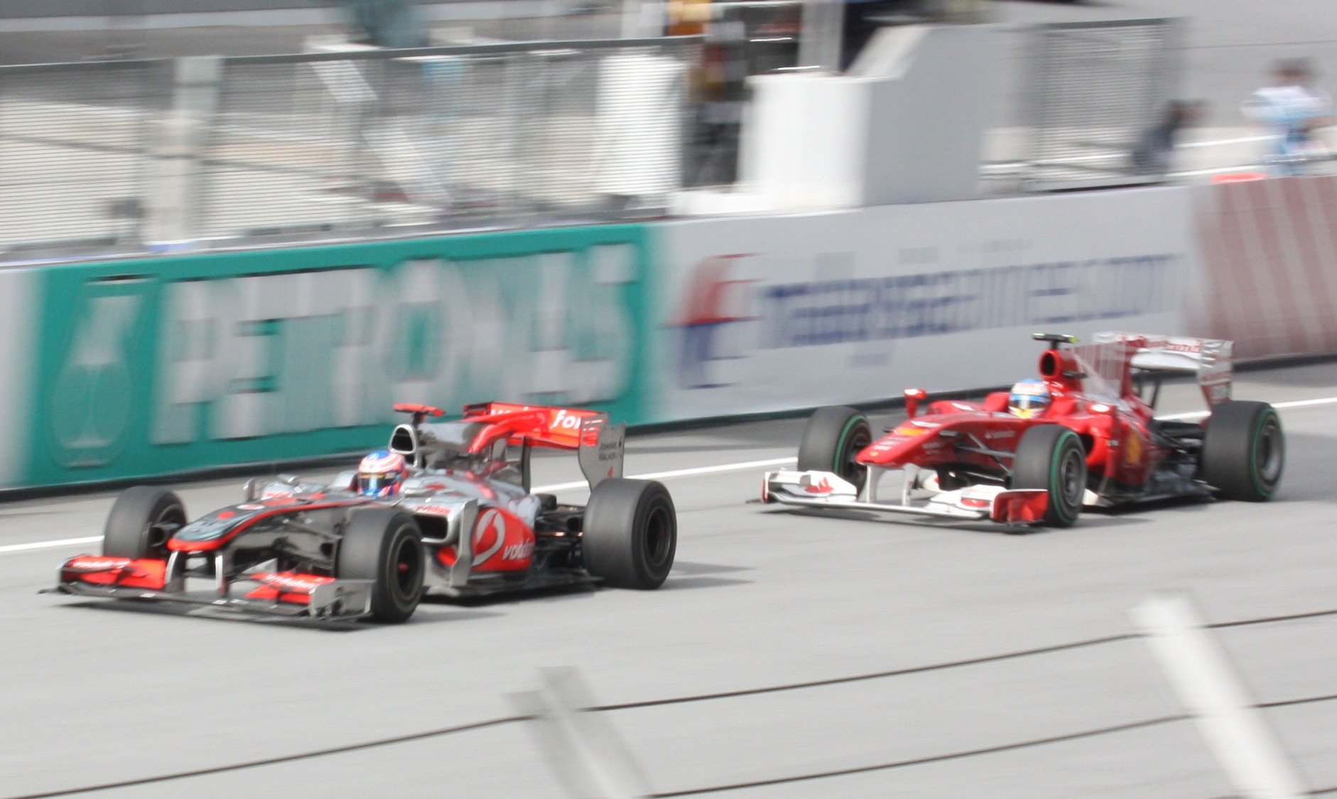 Alonso and Button at Malaysia